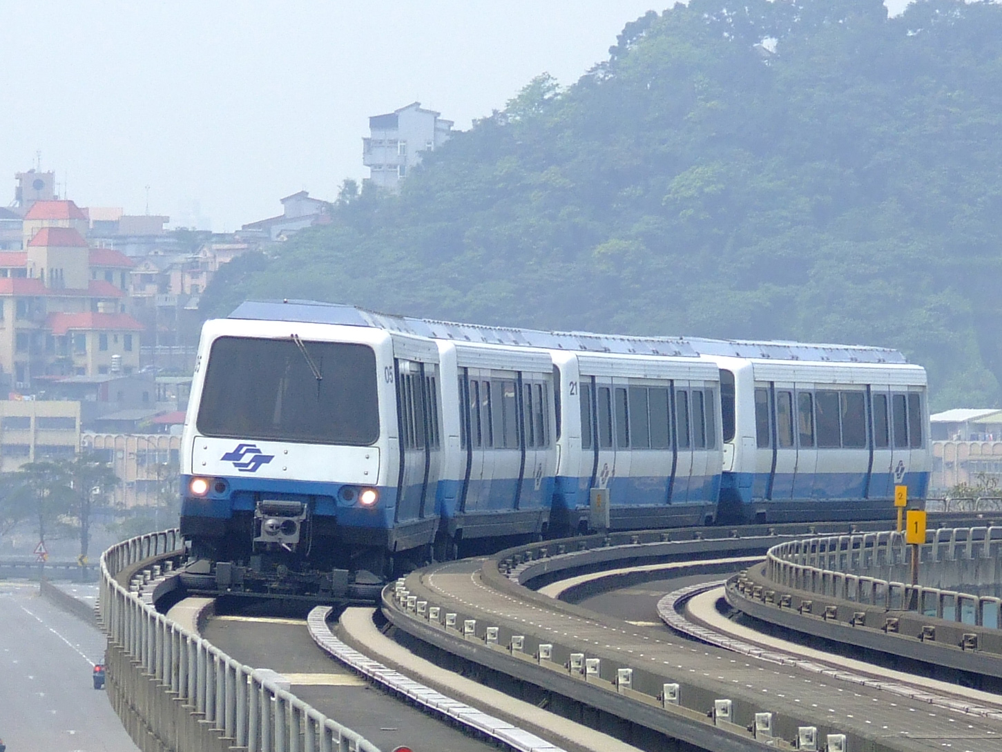 台北捷運文山線（AGT）VAL256系電車（フランスMATRA製）。